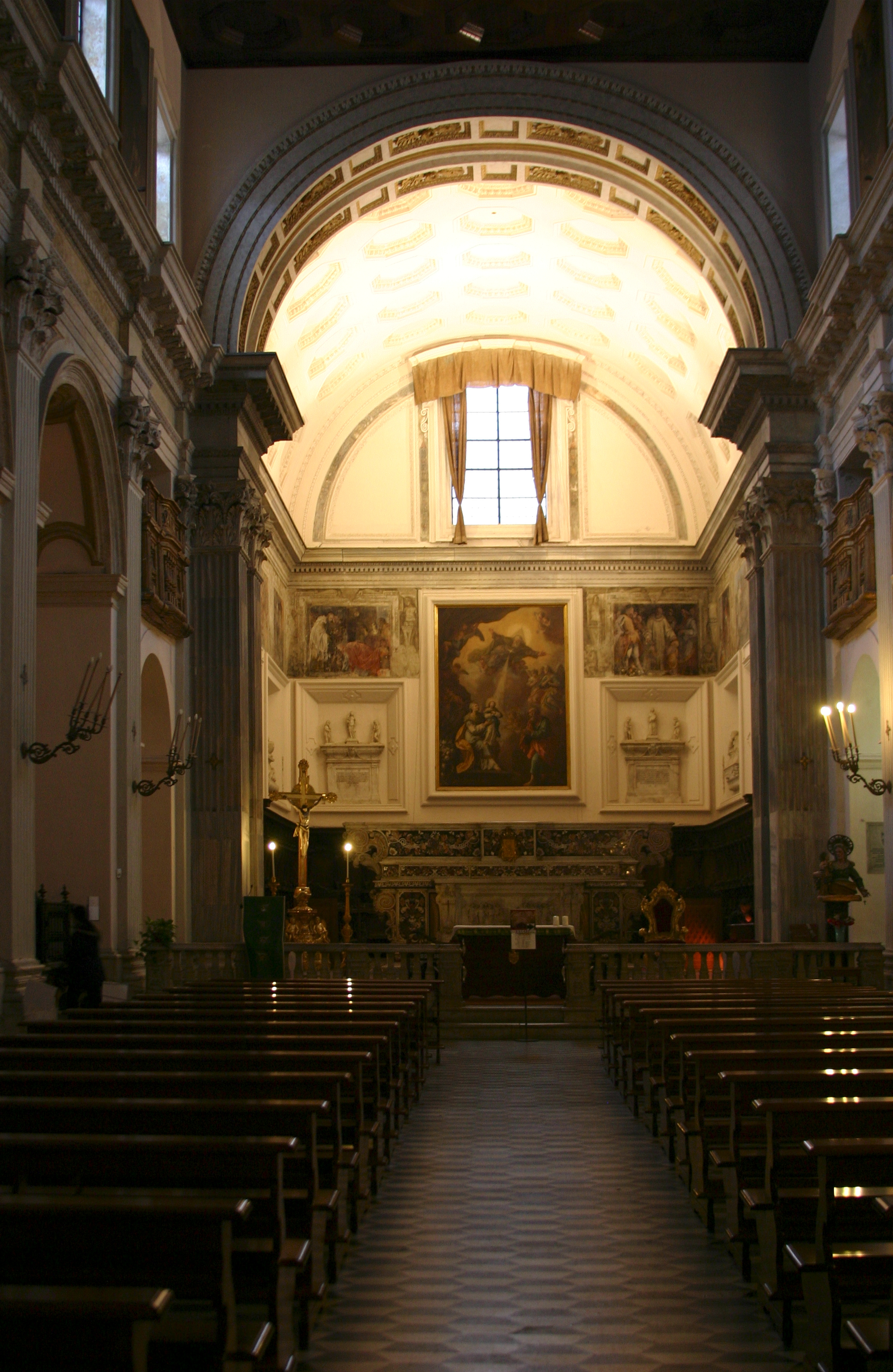 Sant'Anna dei Lombardi - Nápoles